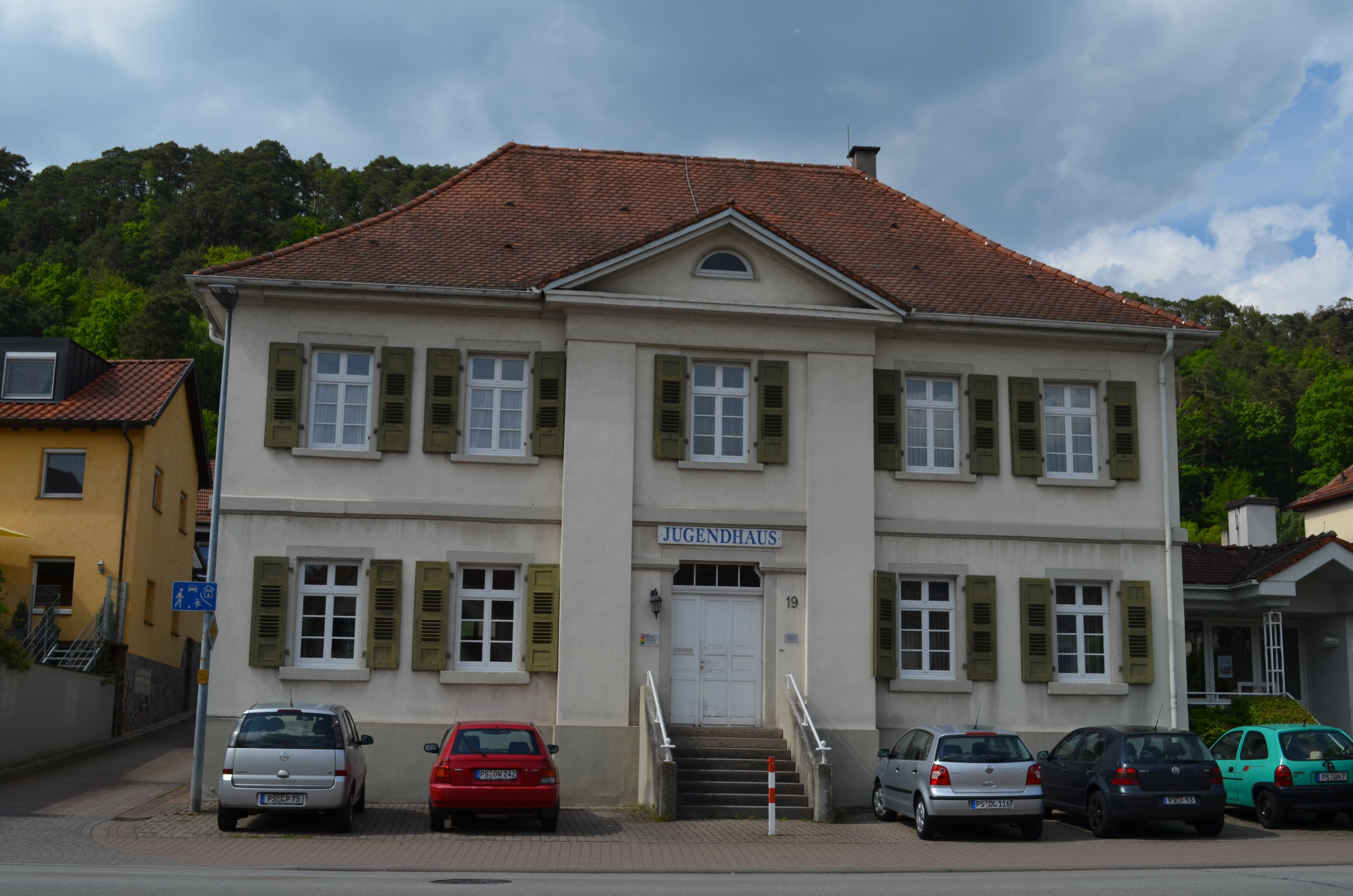 Schulstraße 19 in Dahn: Ingbert-Naab-Haus, klassizistischer Walmdachbau, Mittelrisalit, Anfang des 19. Jahrhunderts